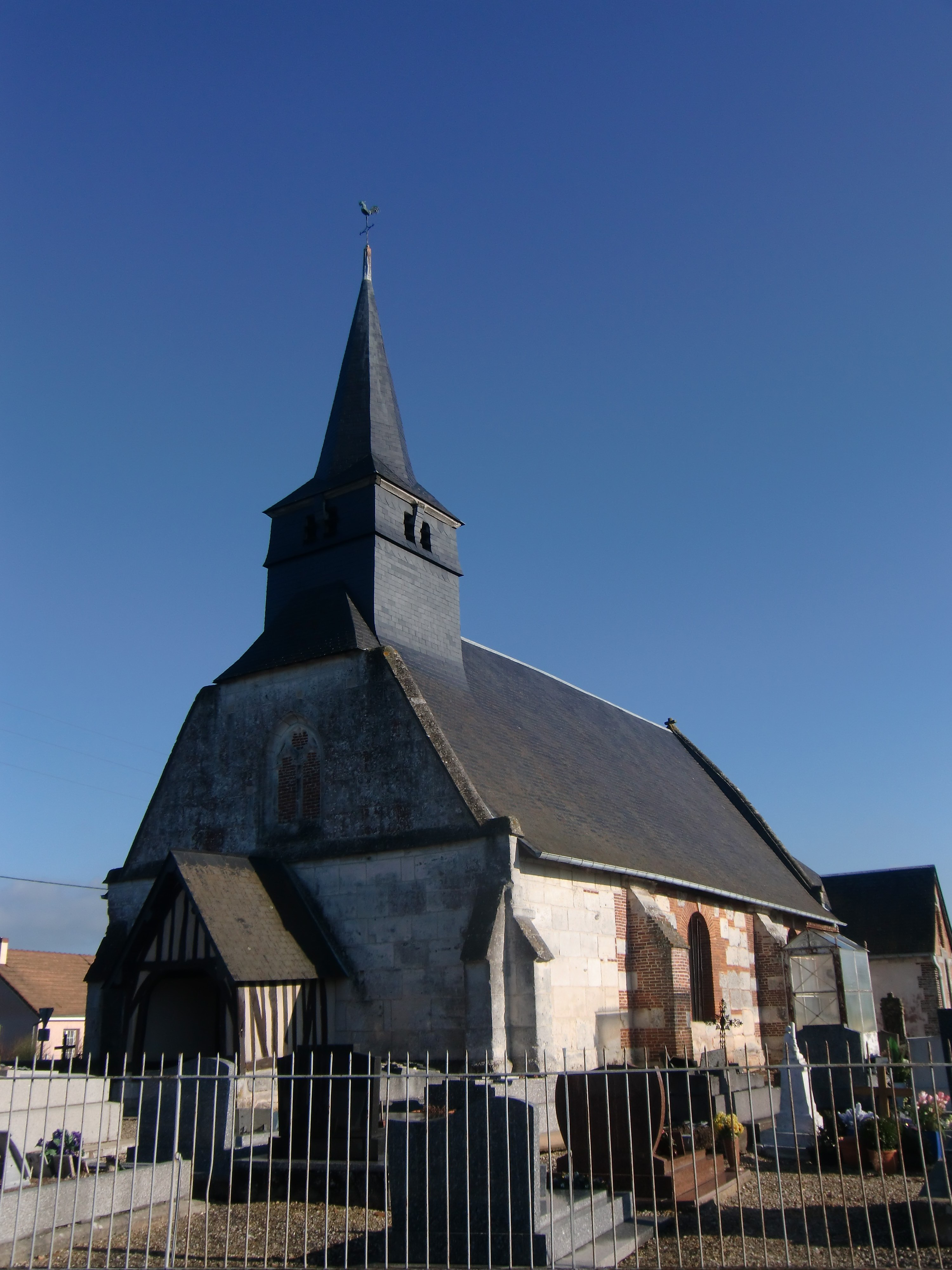 Église Saint-Julien de Cauverville-en-Roumois (Eure, Normandie, France).